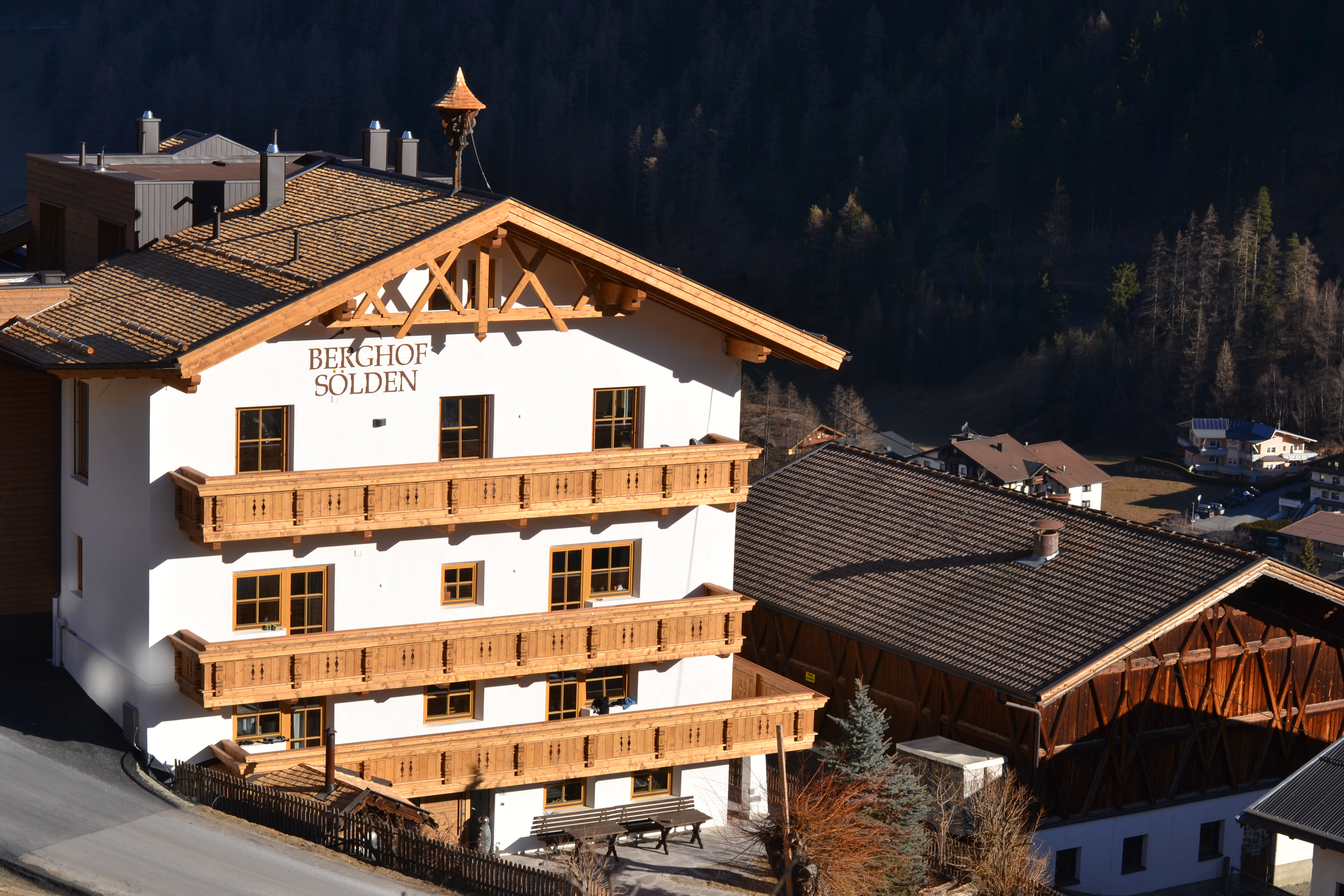 Berghof Sölden im Herbst 2016